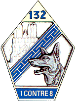 Insigne du 132e bataillon cynophile